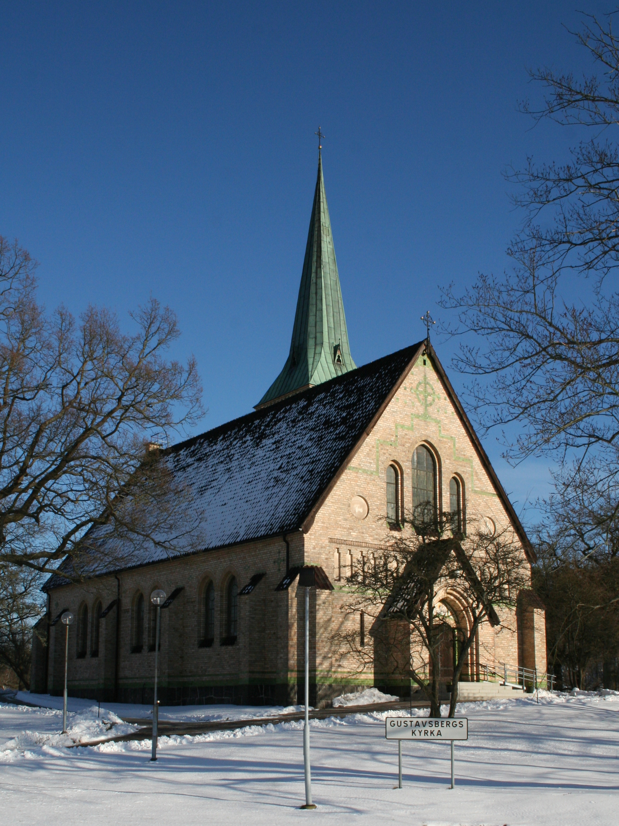 Gustavsbergs kyrka. Källa: eget foto, fotograf EnDumEn mars 2008.